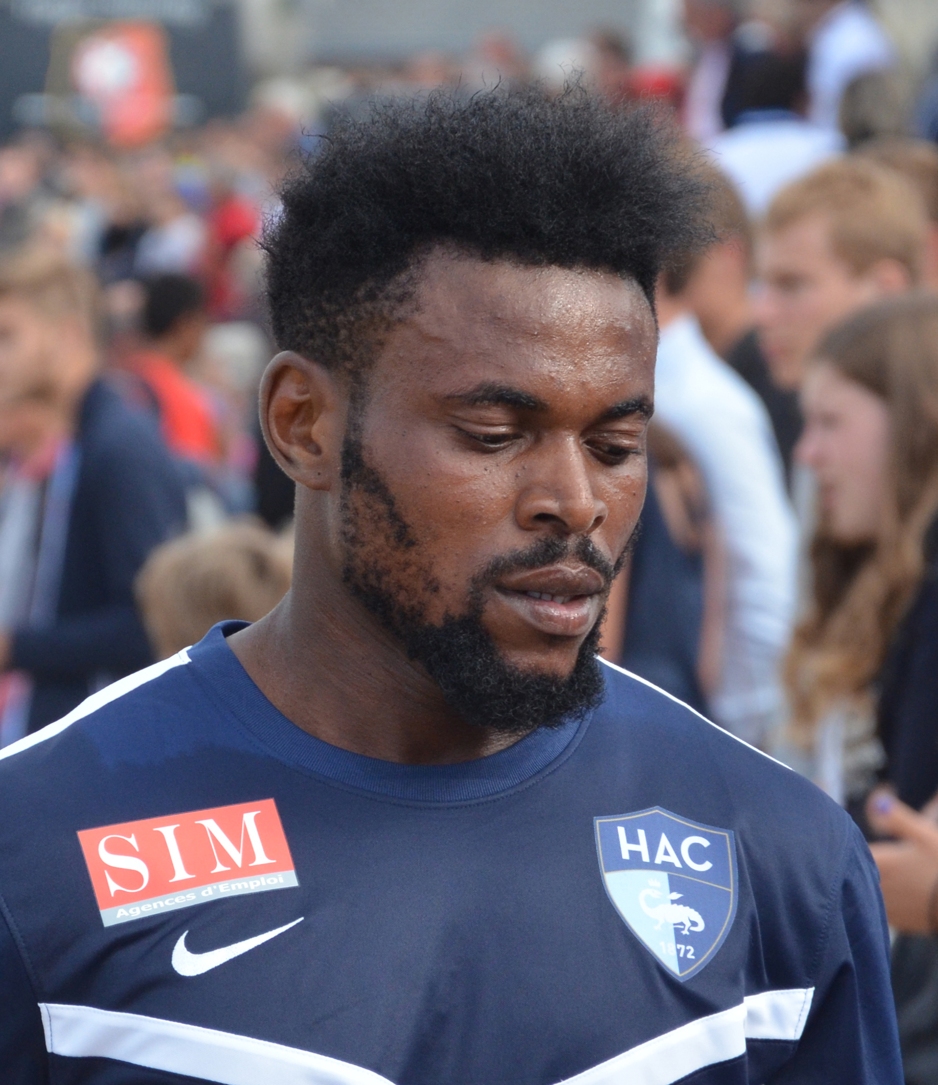 Photographie prise lors du match opposant le Stade rennais au Havre AC en amical au stade Paul-Audrin de Dinard le 8 juillet 2015. Ici, Akeem Agbetu.